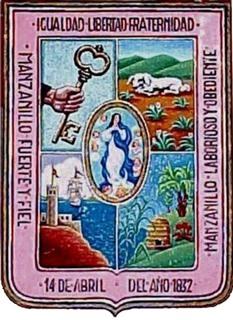 Escudo de Armas de la Ciudad de Manzanillo. Después de terminada la dominación española en Cuba, el lema superior de Religión-Rey-Patria, fue sustituido por el de Igualdad-Libertad-Fraternidad que es el que actualmente ostenta. (Tomado de Enciclopedia Manzanillo )